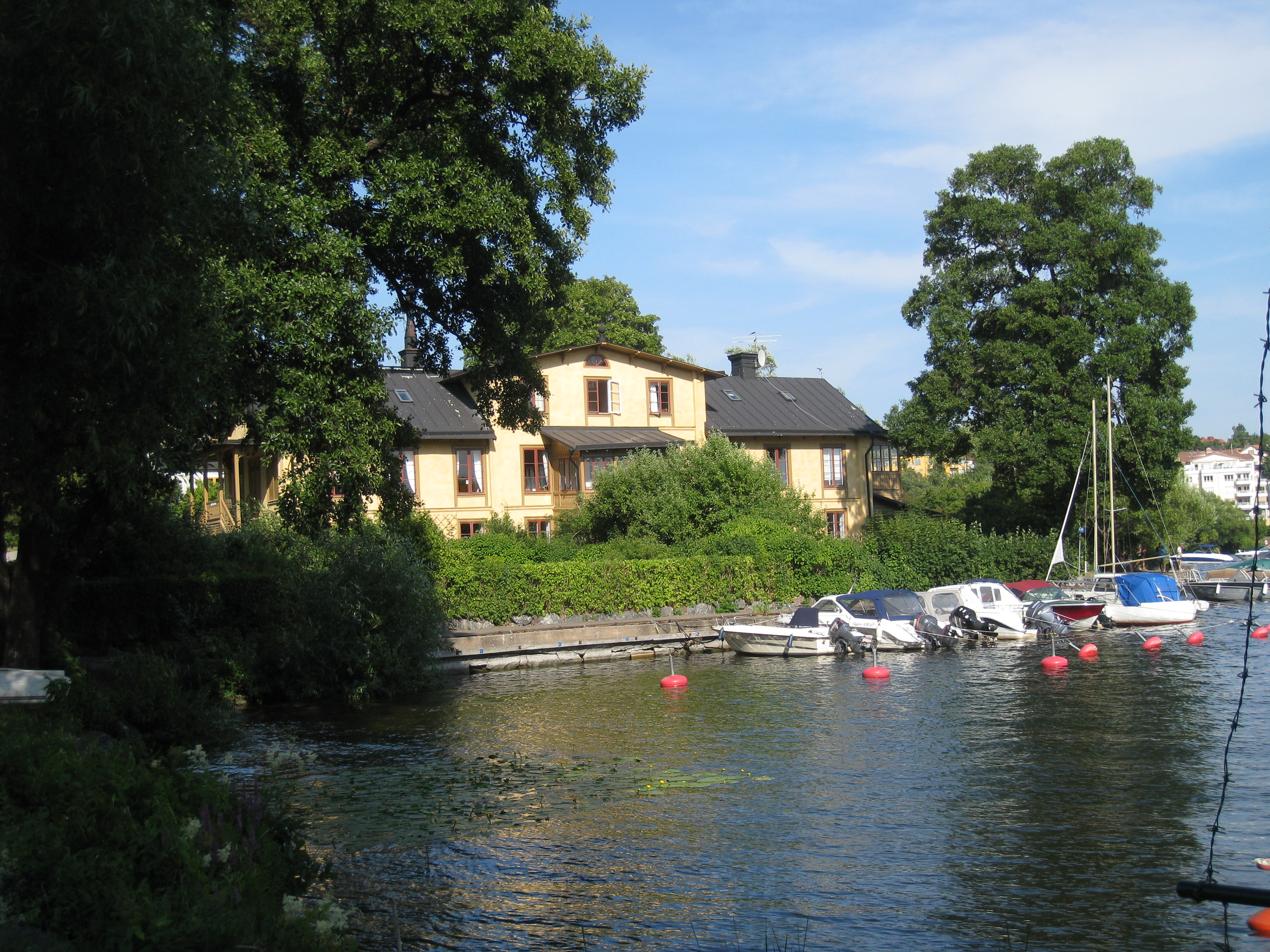 Stora sjövillan i Äppelviken i Bromma tillhör "Mälarstrandens sommarbebyggelse". Vy från hamnen mot öster.